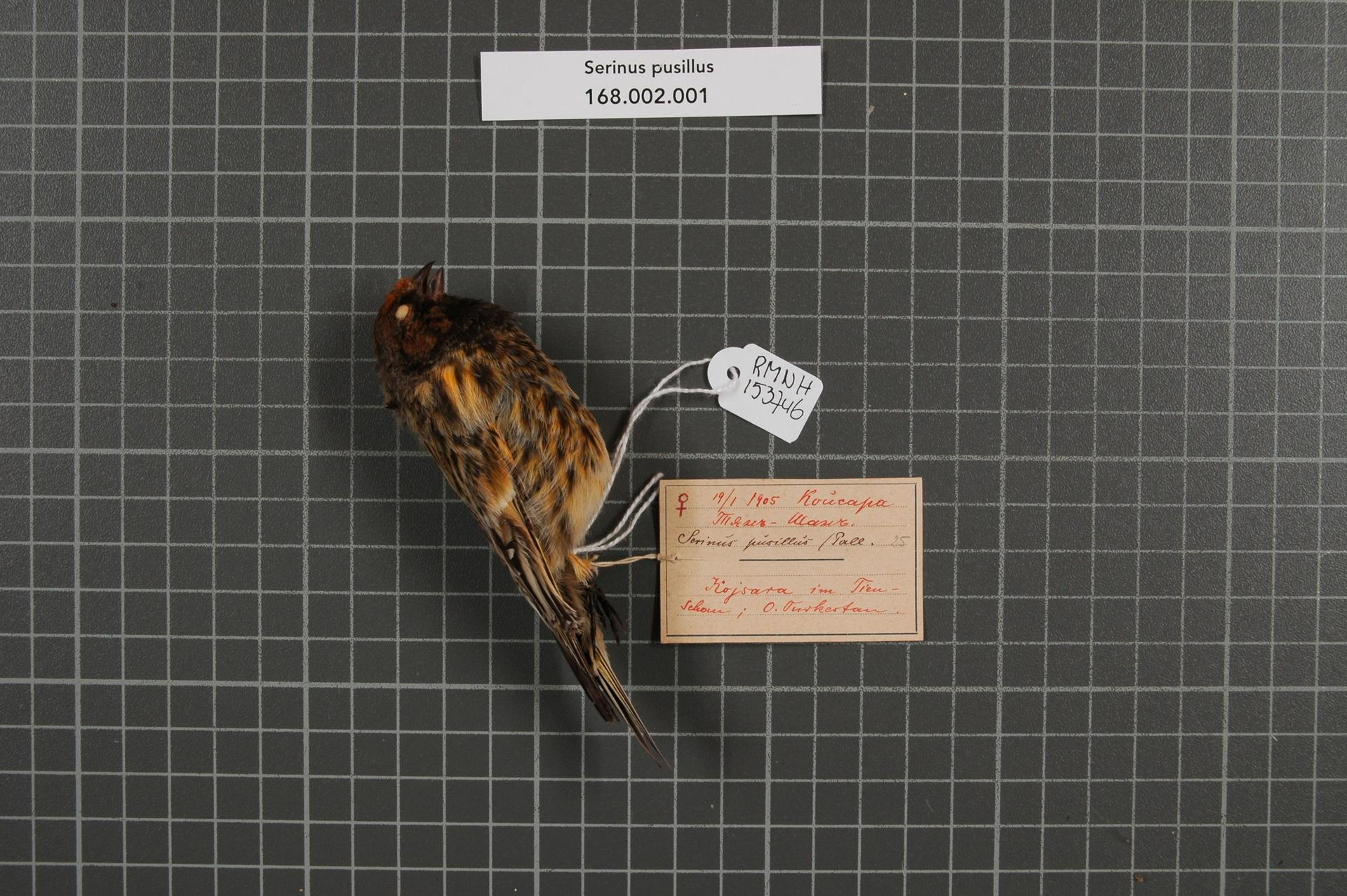 Serinus pusillus (Pallas, 1827)